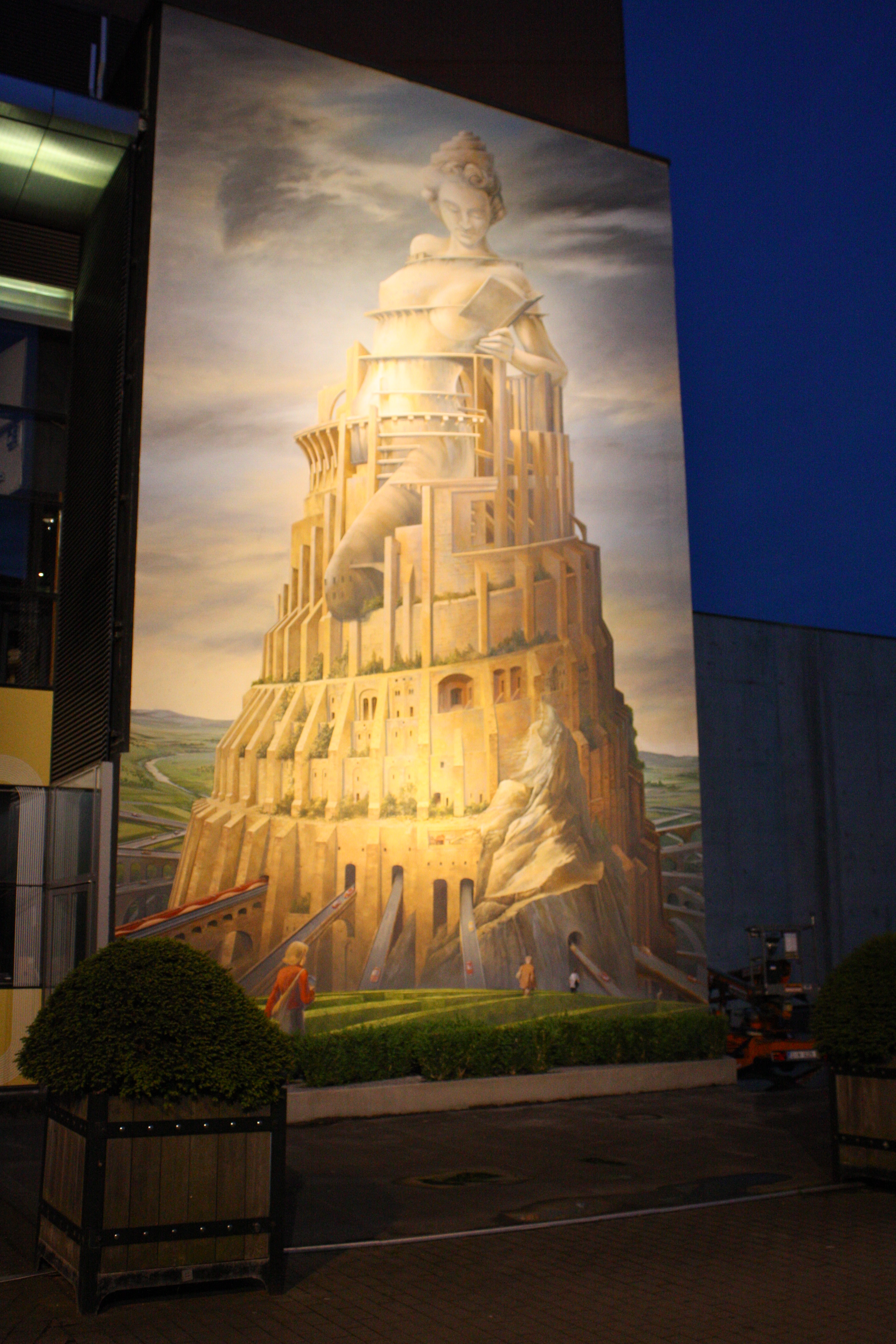 Réalisée par l’artiste peintre Alexandre Obolensky et conçue par François Schuiten, La Tour infinie est une œuvre d’envergure destinée à orner un pan de mur de la Grand Place de Louvain-la-Neuve. Cette fresque de treize mètres de haut, installée pour quinze ans minimum, est une nouvelle contribution artistique destinée à embellir la ville.